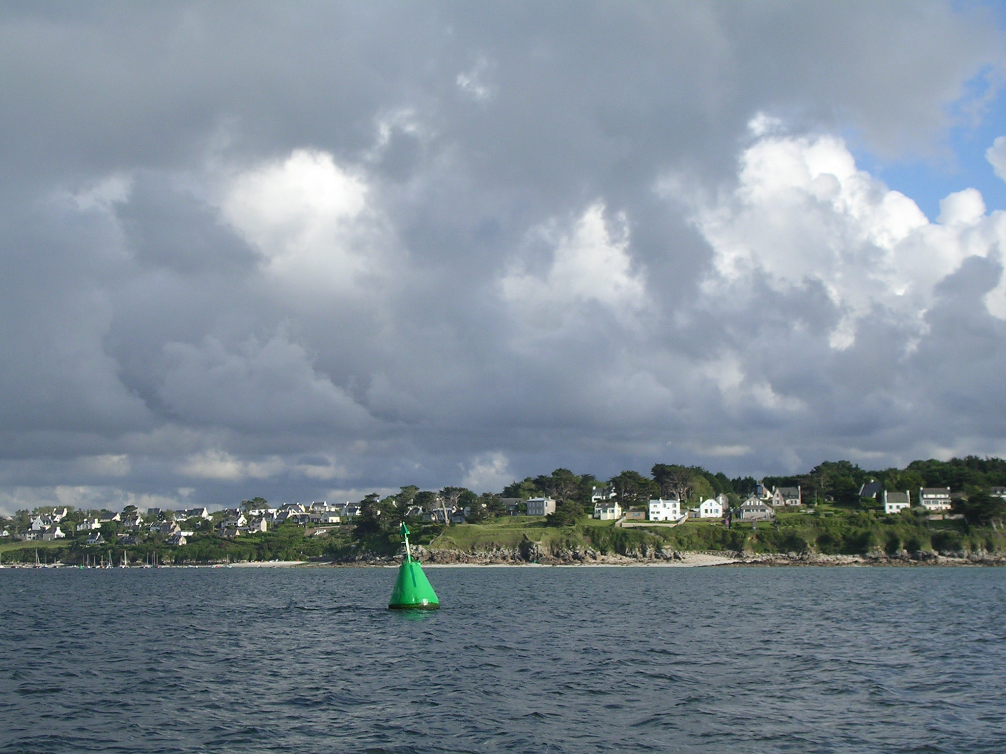 vue de l'entree de l'aber benoit